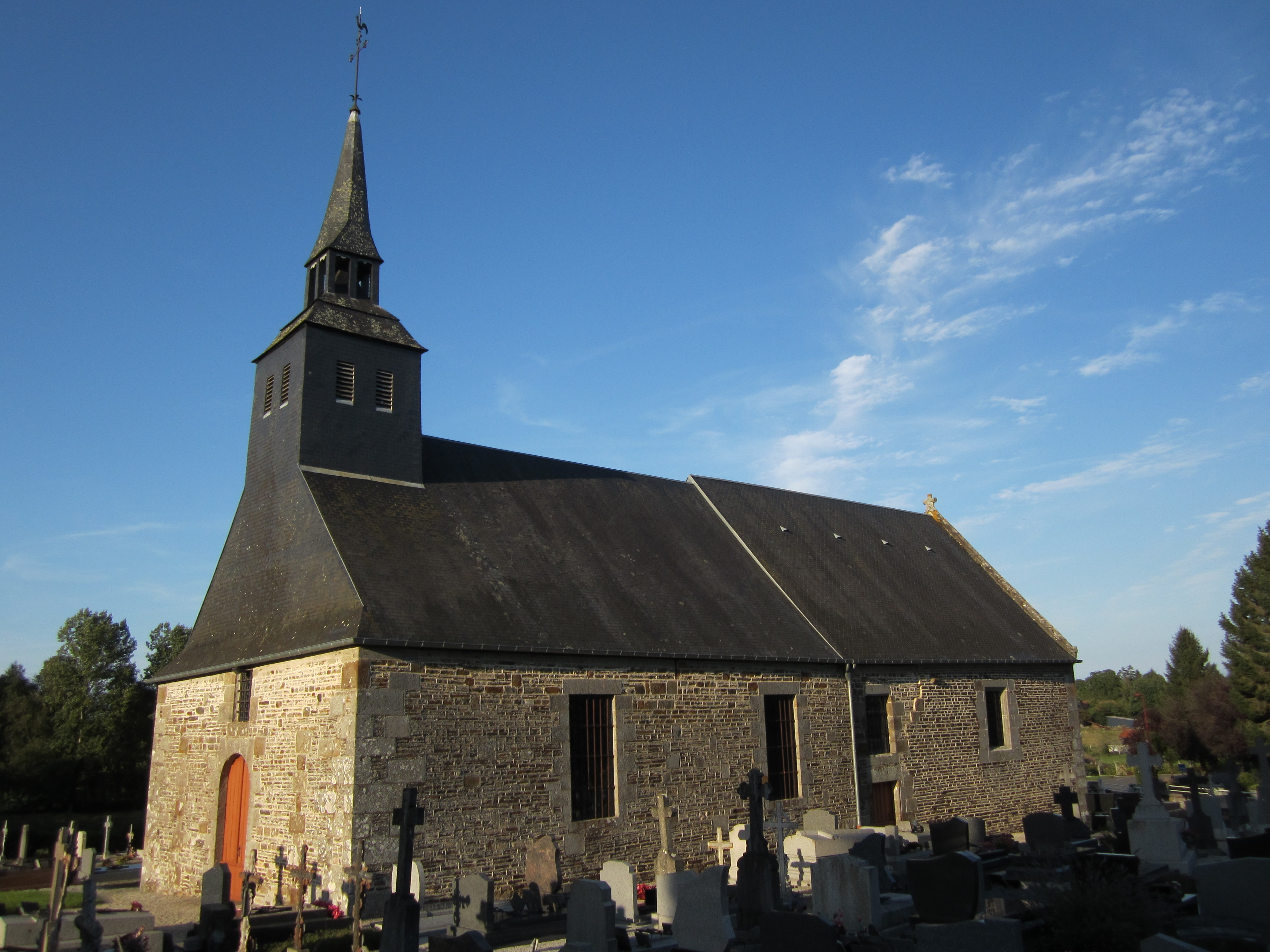 Martigny, Manche